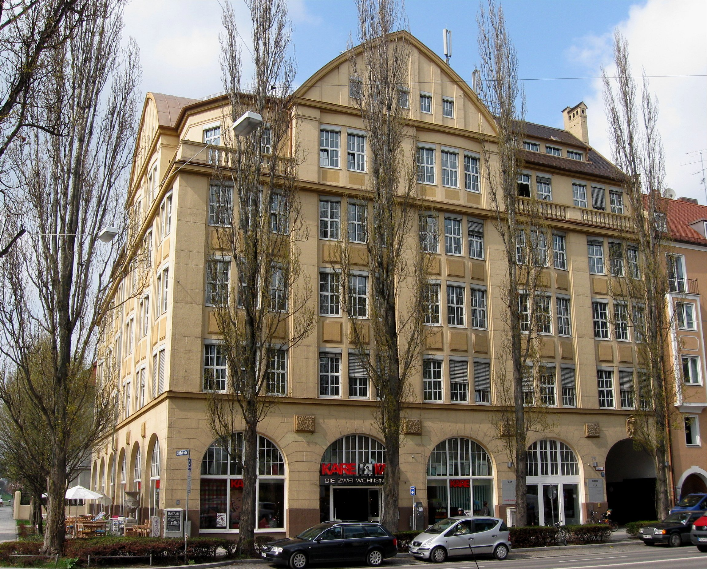 Büro- und Geschäftshaus in München, Ludwigsvorstadt, Lindwurmstraße 76 / Güllstraße; erbaut 1911–1912 von der Bauunternehmung Heilmann & Littmann; unter Denkmalschutz